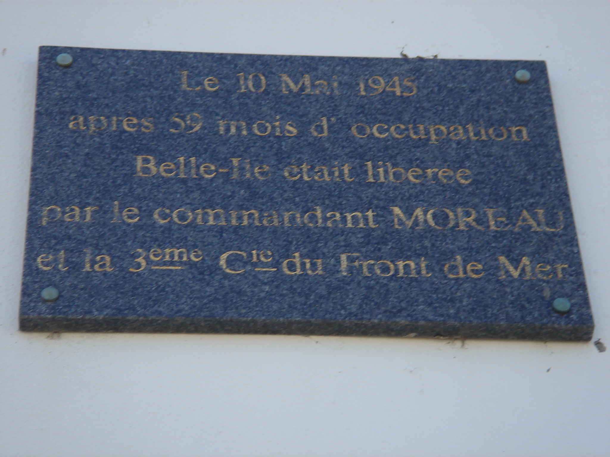 Plaque commémorative qui se trouvait sur l'immeuble des services des Ponts et Chaussée et de l'équipement, sur le port, à Palais (56).